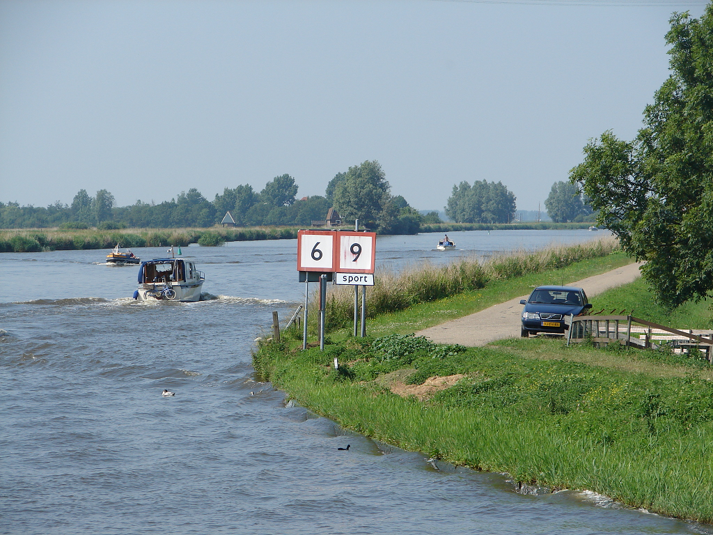 Deze foto heb ik gemaakt en stel ik beschikbaar. (Original text: Markervaart, zuidzijde)